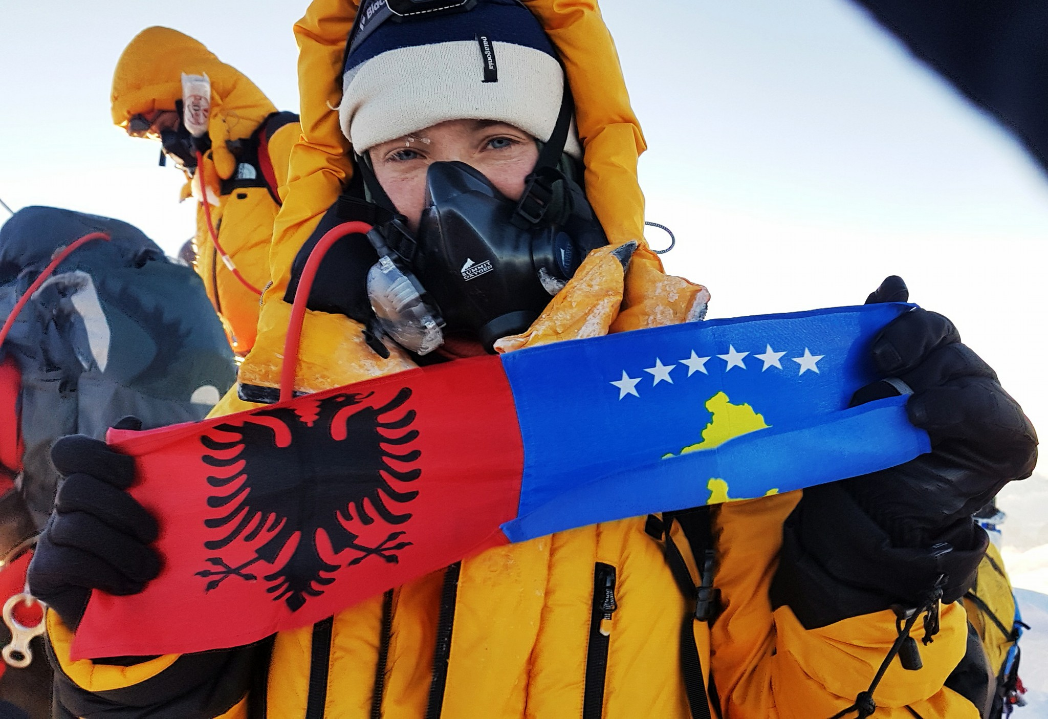 Uta Ibrahimi pas ngjitjes së majes Mont Everest